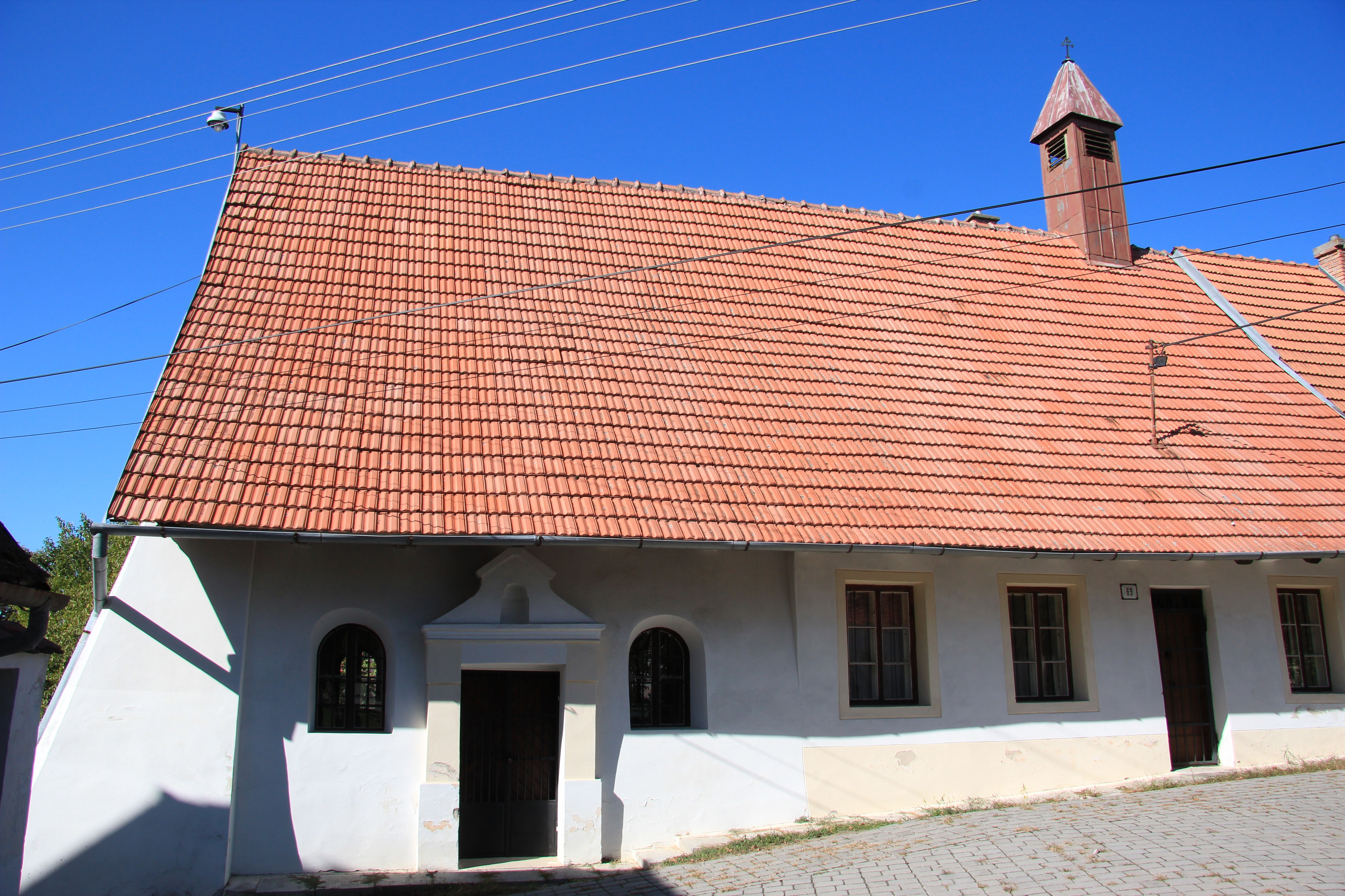 Habaner Kapelle in Veľké Leváre Hausnr.69